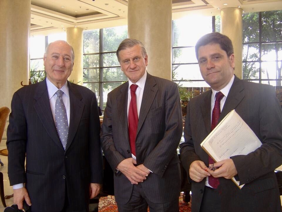 Con el Dr. Valentín Fuster, New York, invitado en varios de los simposios dirigidos por el Dr. Esper